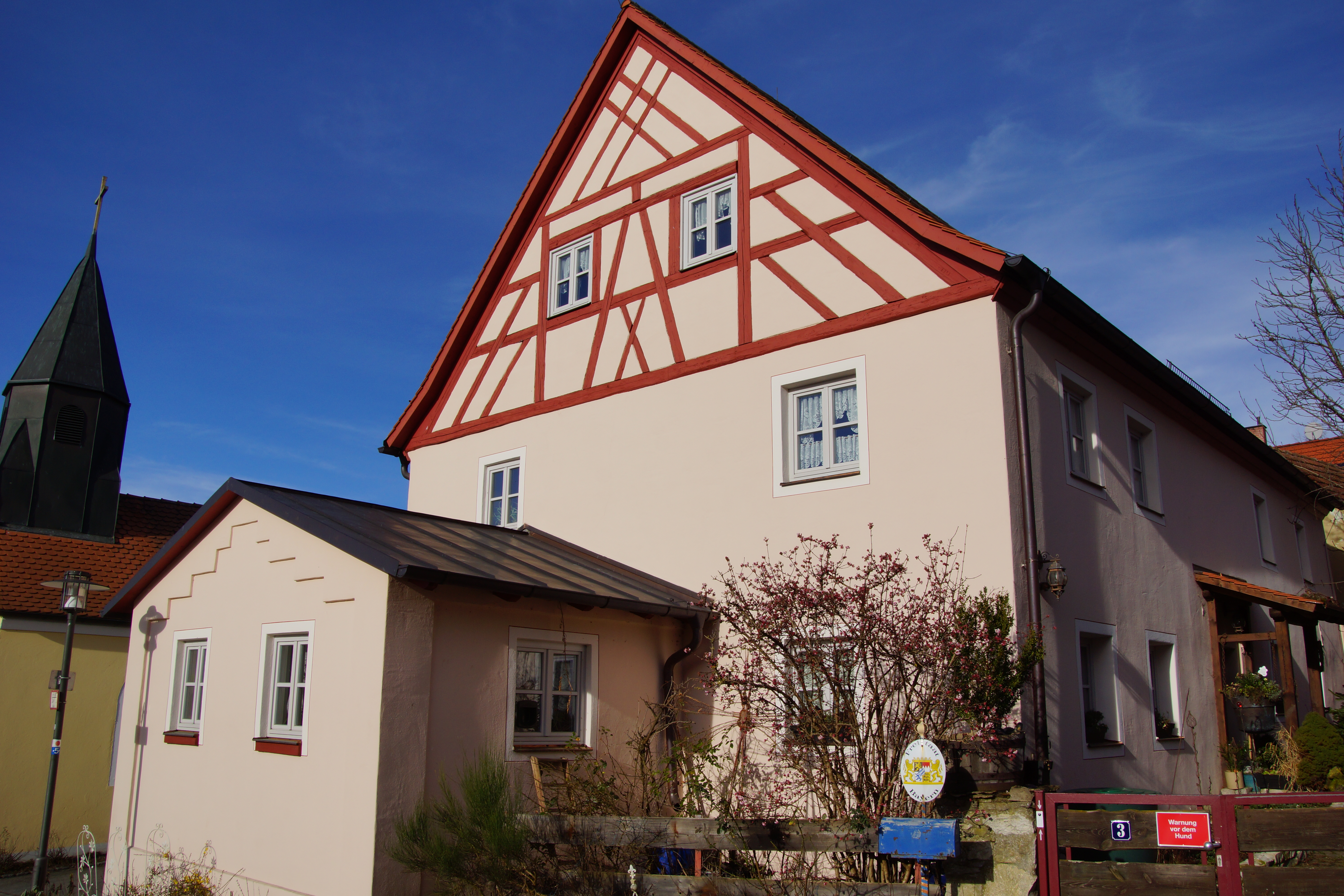 Tyrolsberg, Gemeinde Berngau